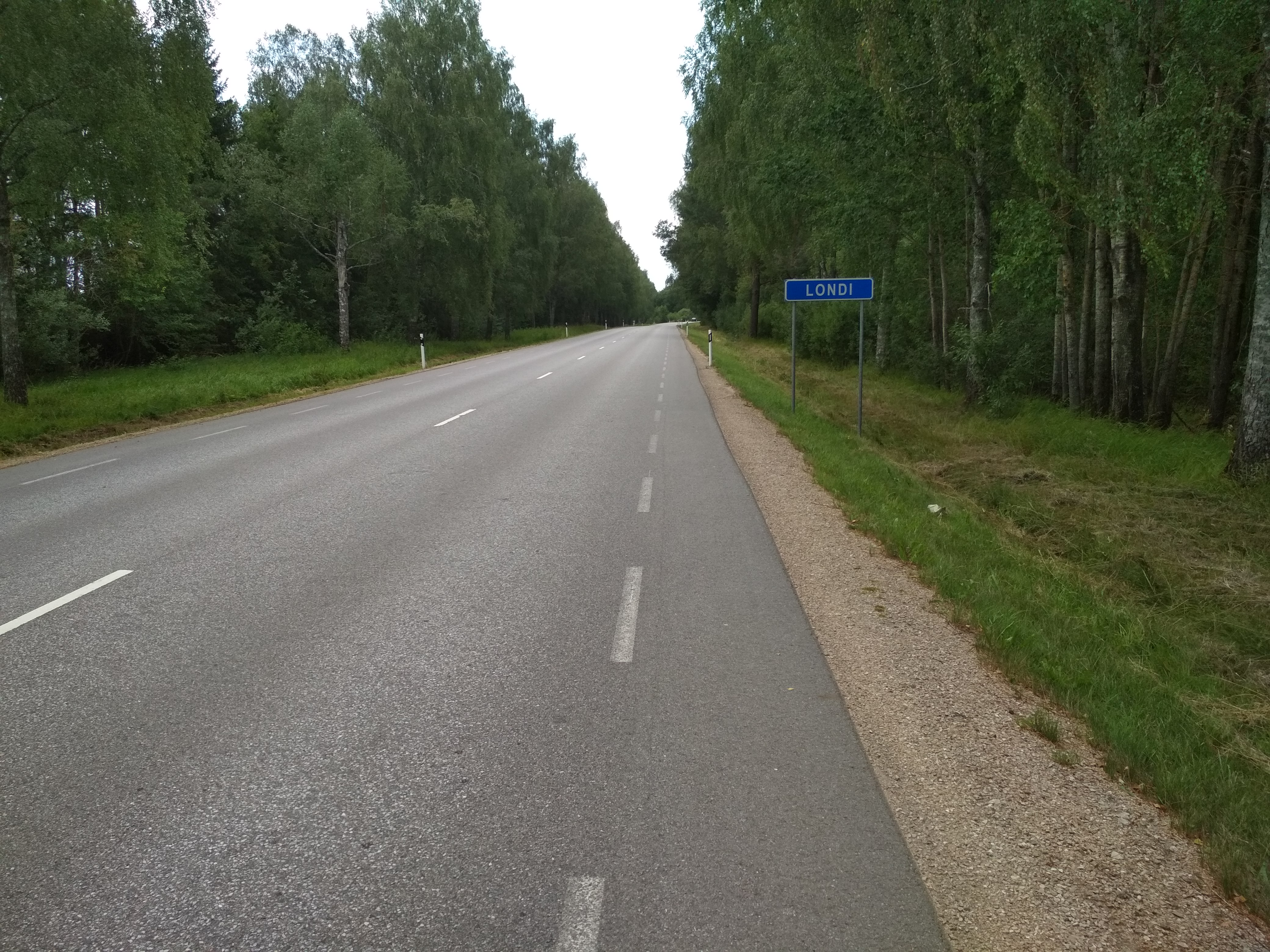 Londi küla Valga vallas, Valga-Võru maantee